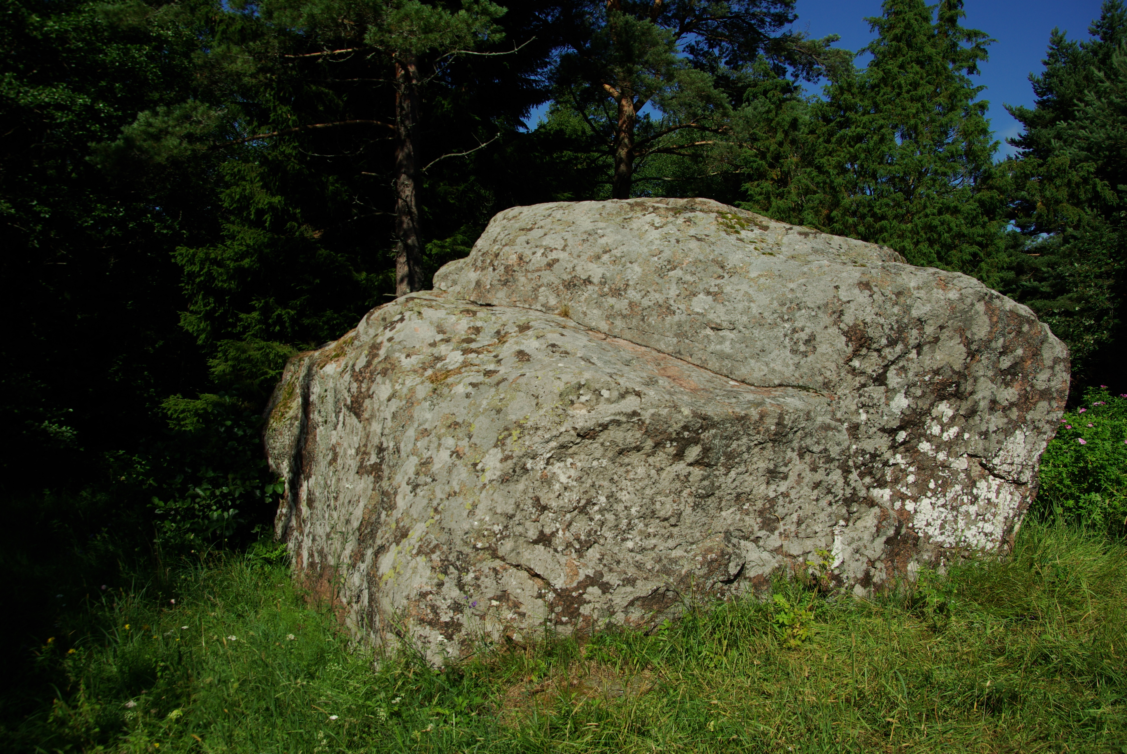 Põrgukivi